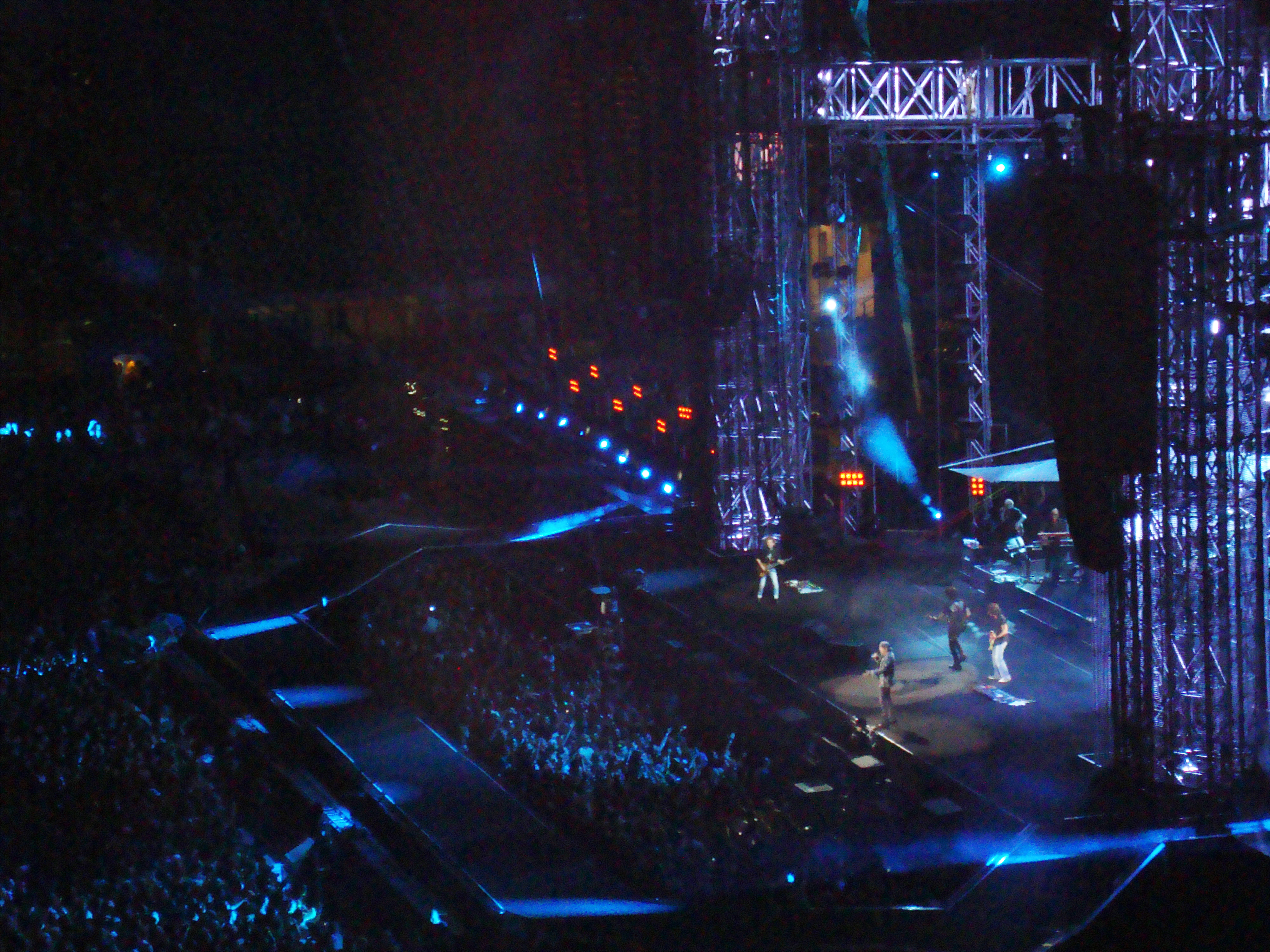 Vasco Rossi Live Kom 2011 Tour San Siro, Milano Italia